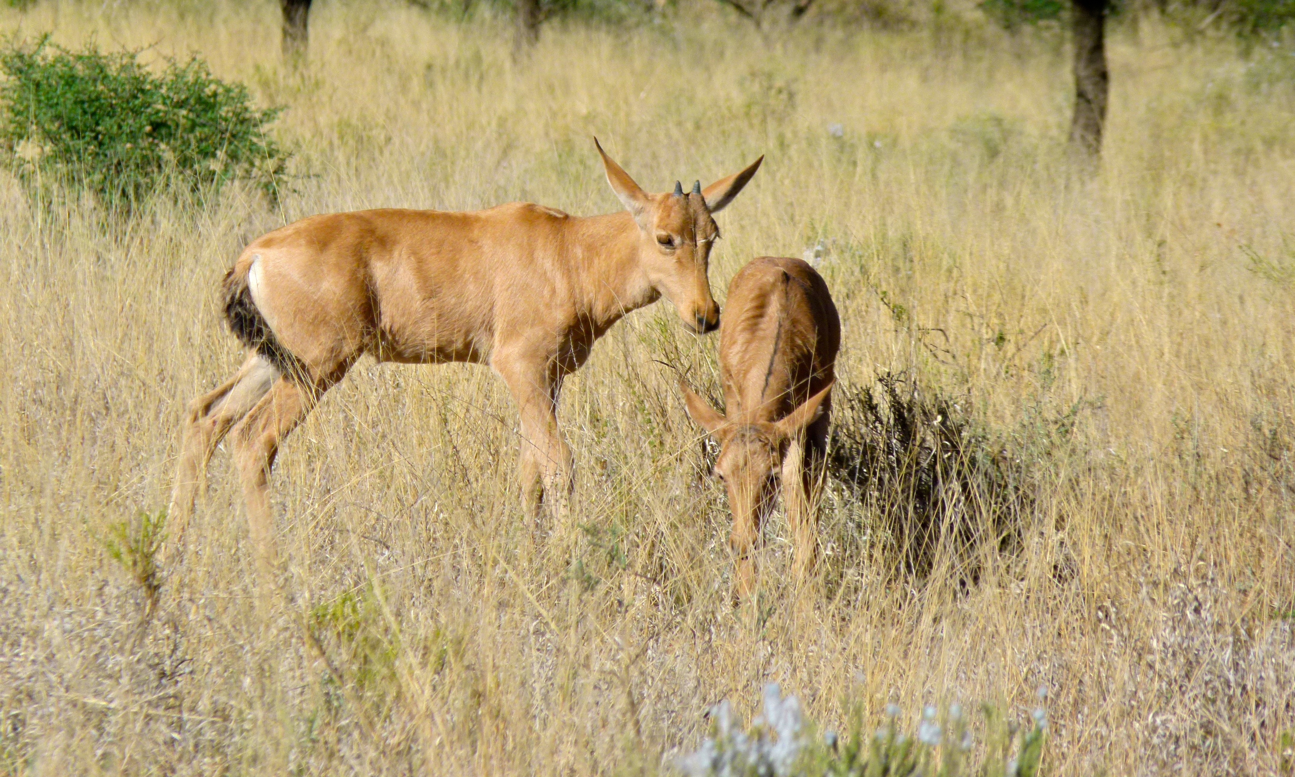 Mokala NP, SOUTH AFRICA